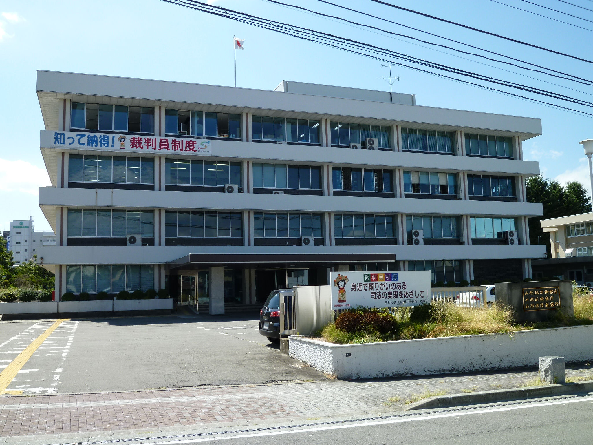 山形地方検察庁（山形県山形市）。山形区検察庁、山形保護観察所併設。法務合同庁舎。